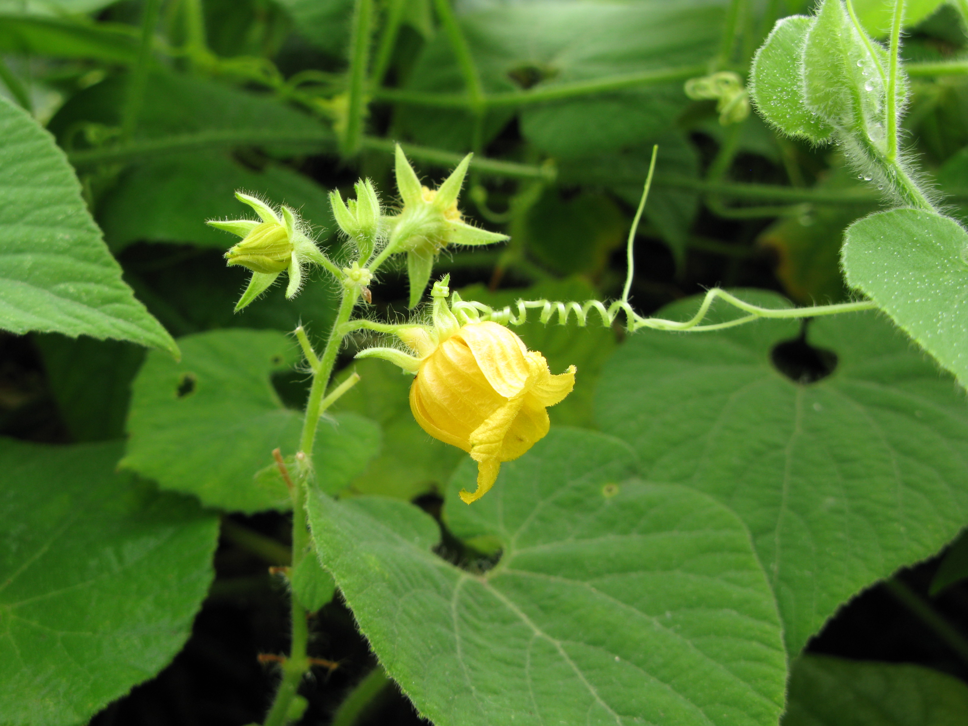 Thladiantha nudiflora dans le parc Peixotto à Talence